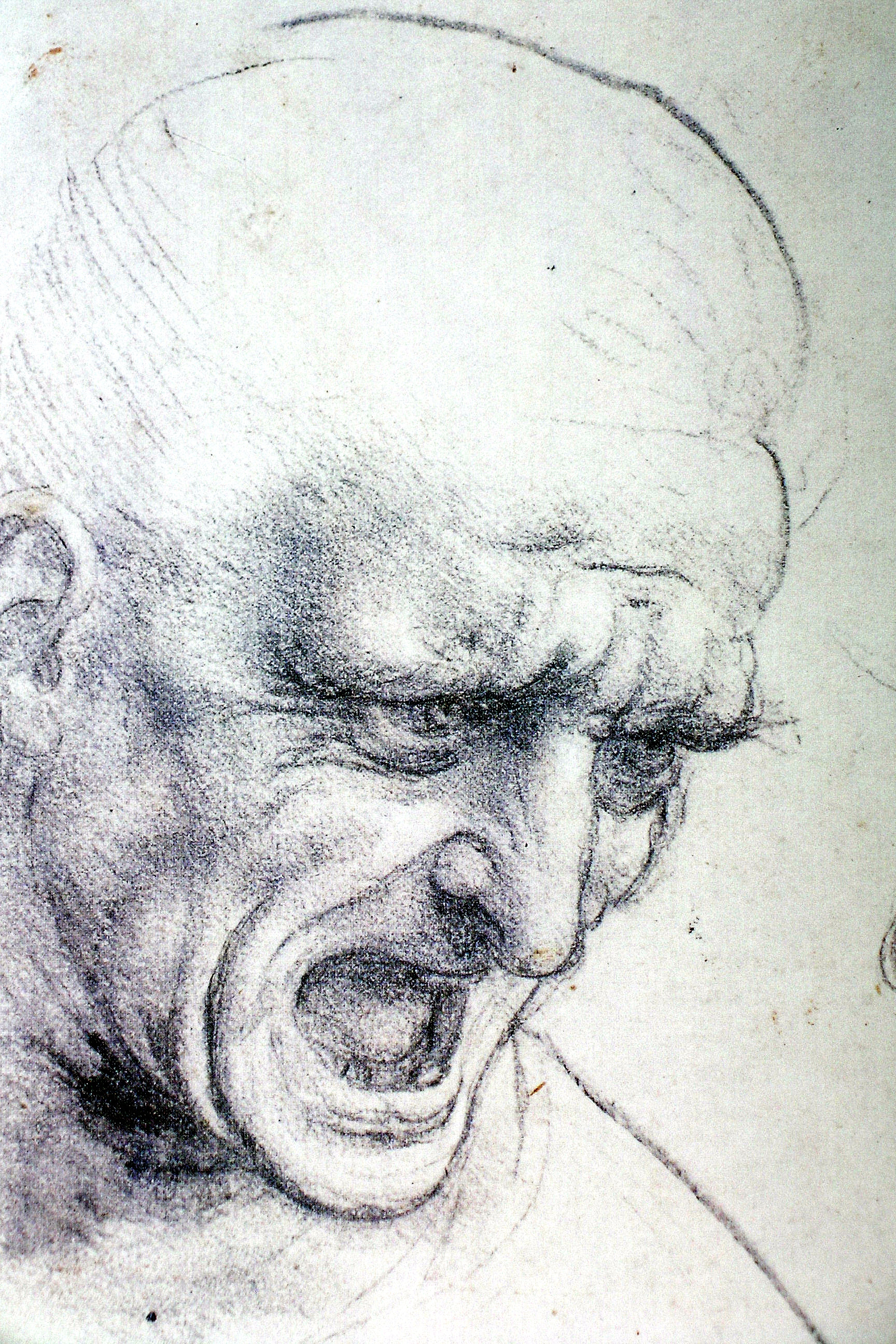 Kopfstudie Anghiarischlacht